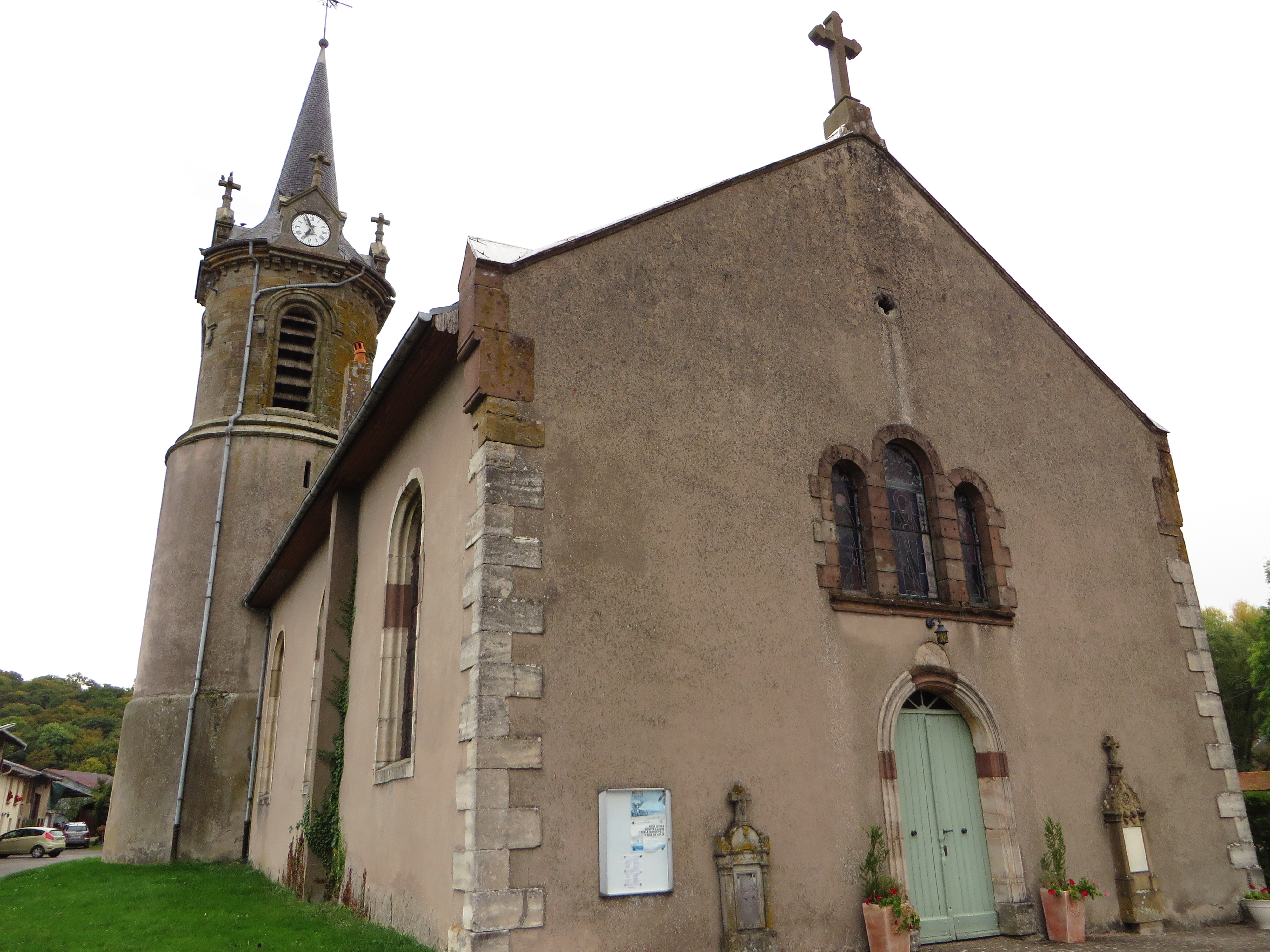 Lidrezing eglise